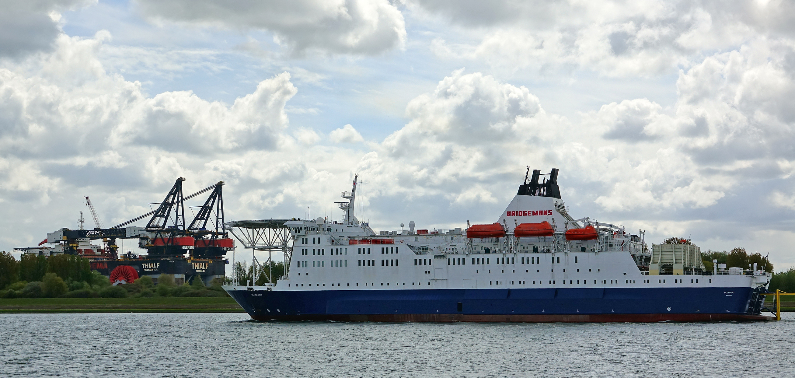 het Scheur Maassluis 27-4-2017